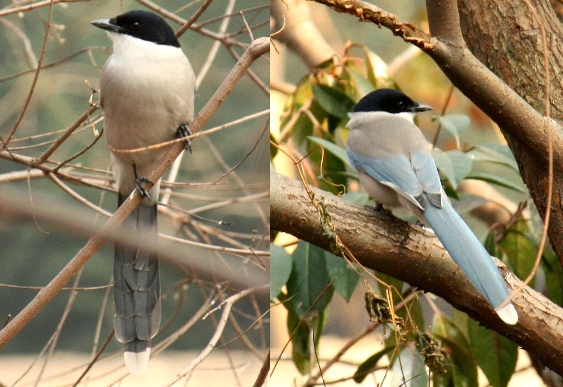 Blauelster in Shanghai